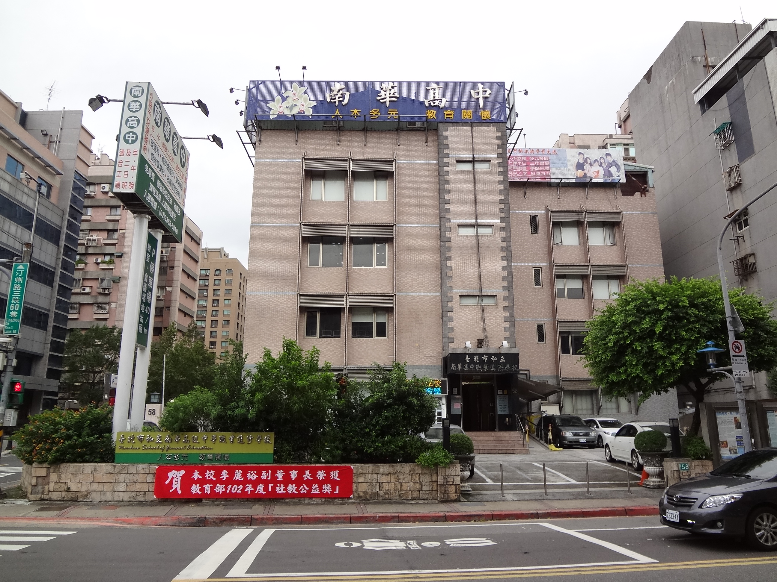 中文（台灣）: 臺北市私立南華高級中學職業進修學校，位於臺灣臺北市中正區汀州路三段58號。